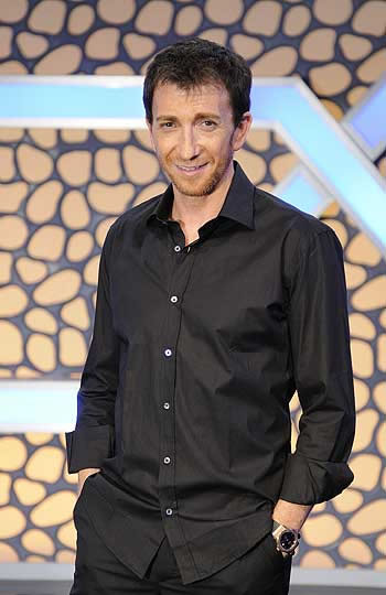 Pablo Motos, presentador de radio y televisión de España